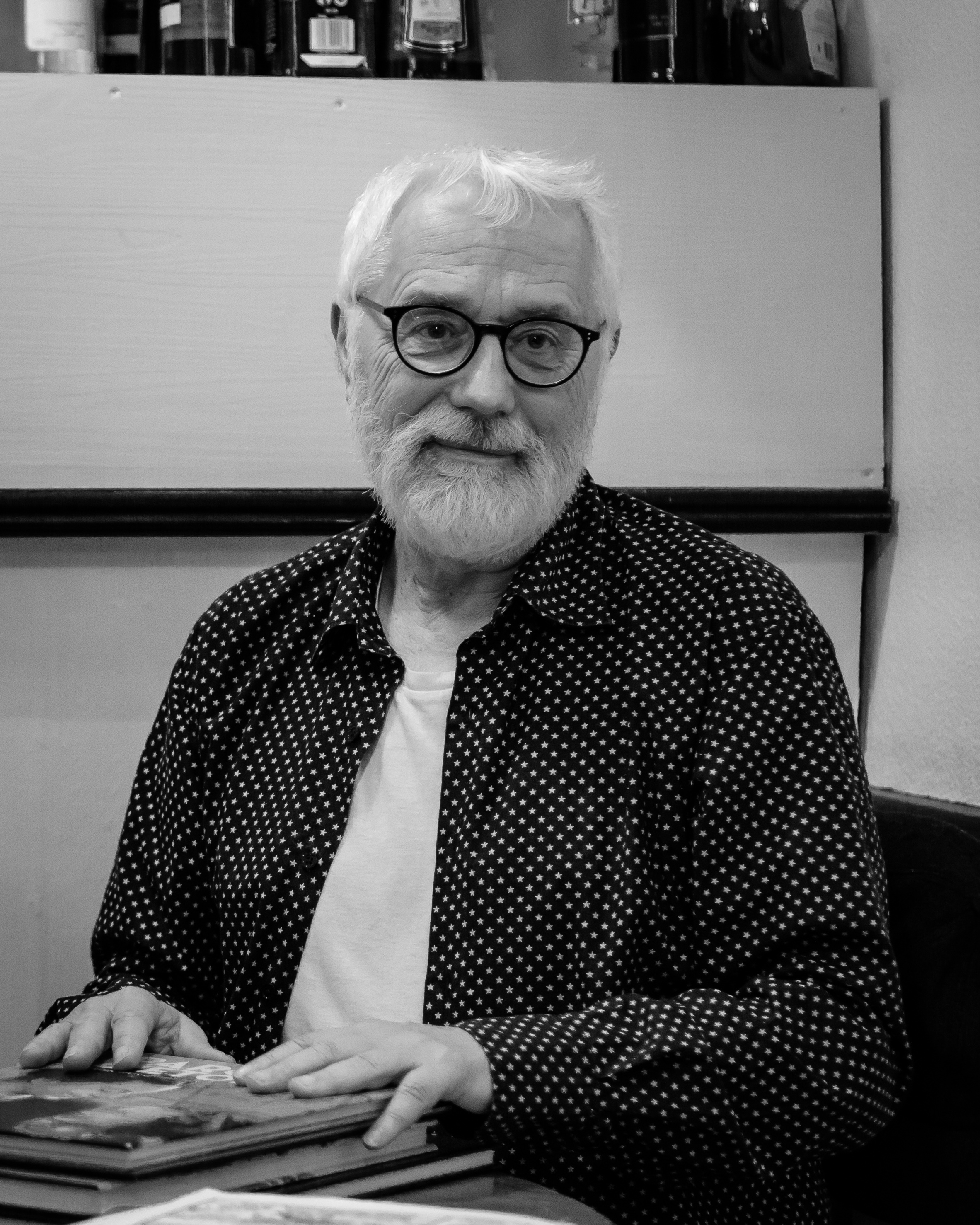 Serge Le Tendre lors d'une rencontre à la Casa Antonio, à Rennes, en novembre 2016.